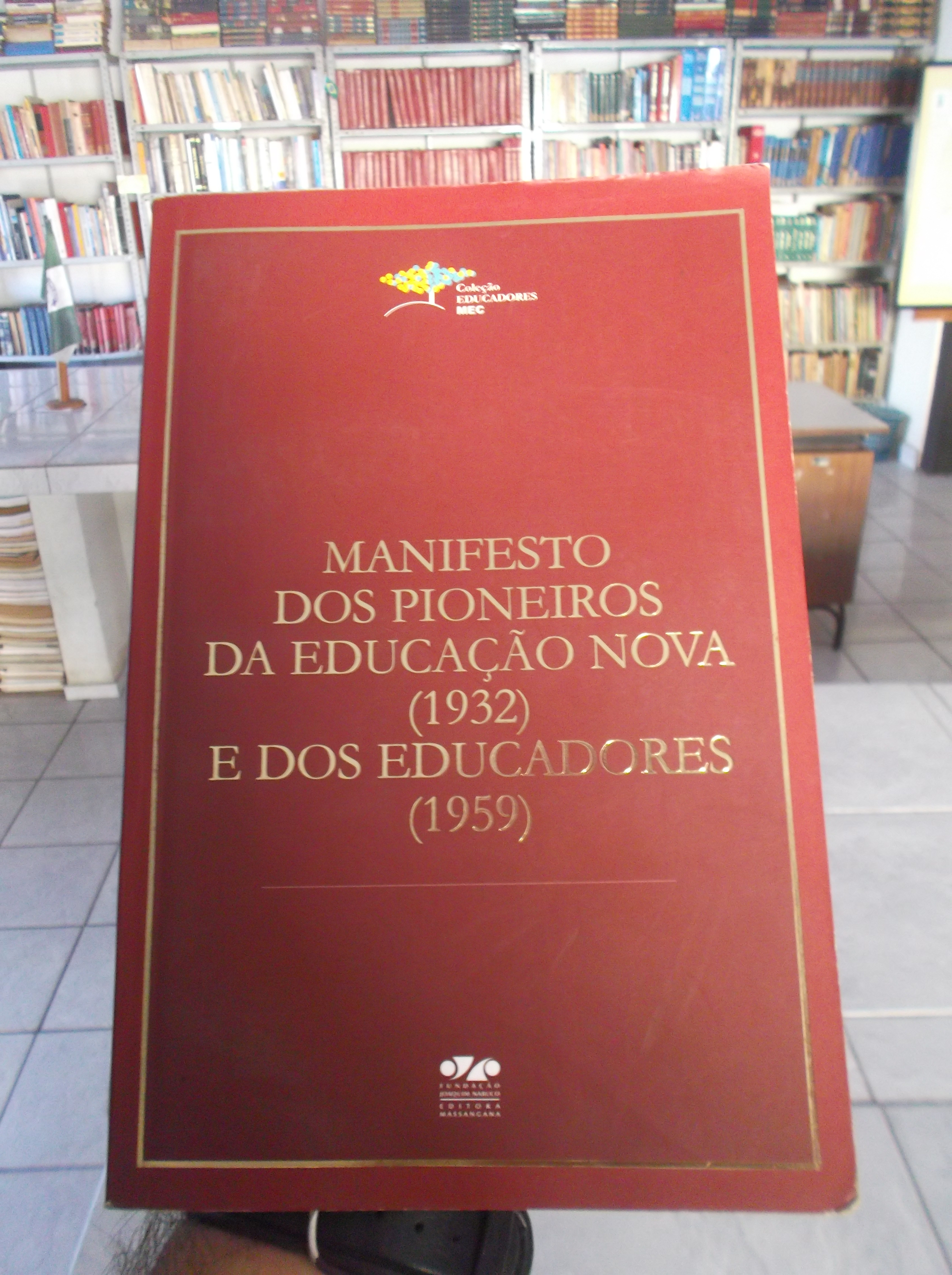 Manifesto dos Pioneiros da Educação de 1932 e de 1959. Este exemplar pertence a autoria dessa imagem.